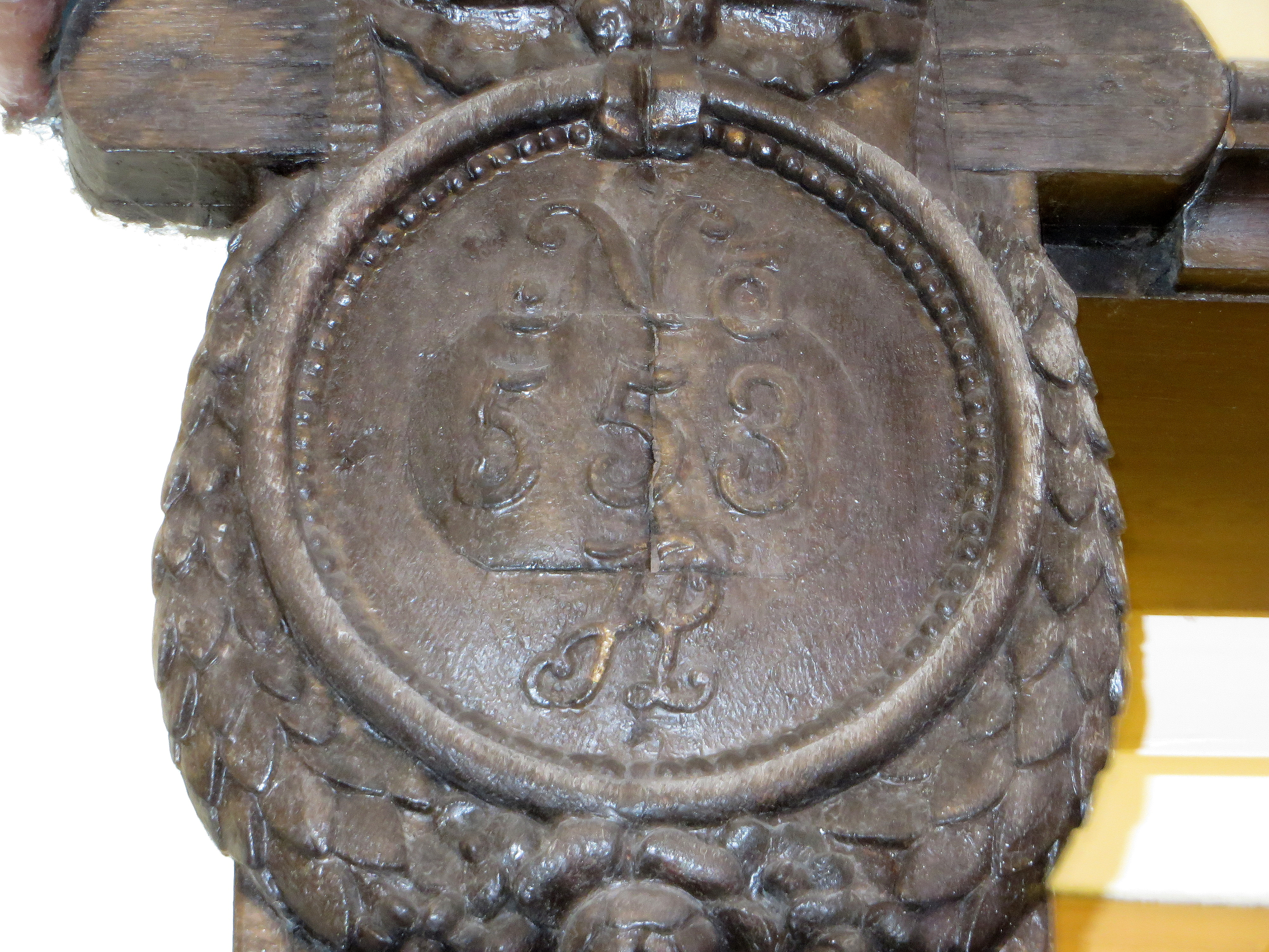 Alte Hausnummer 553 der Löwen-Apotheke (Flensburg 2014-11-12)